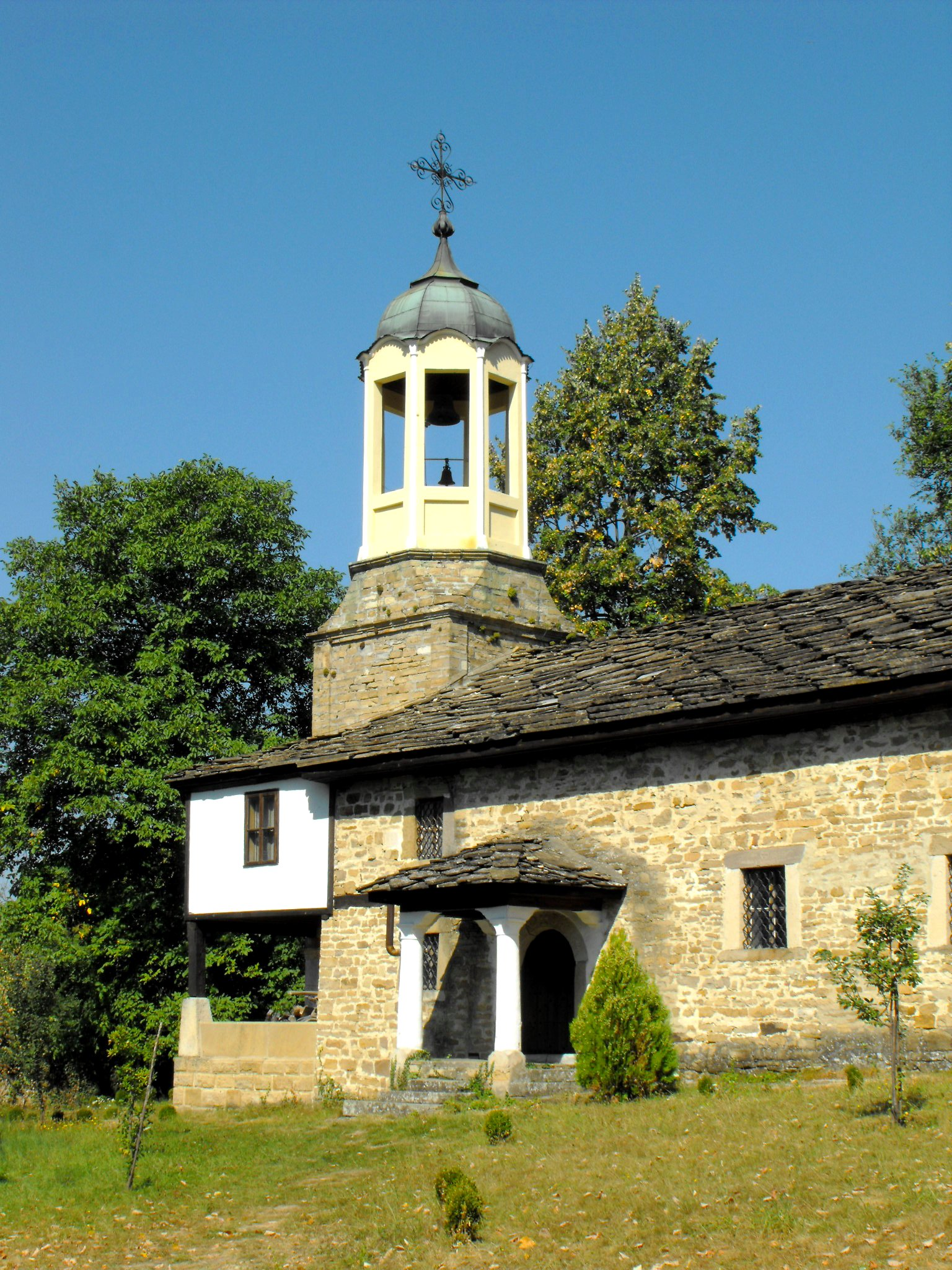 Църквата "Св. Пророк Илия" в село Боженци